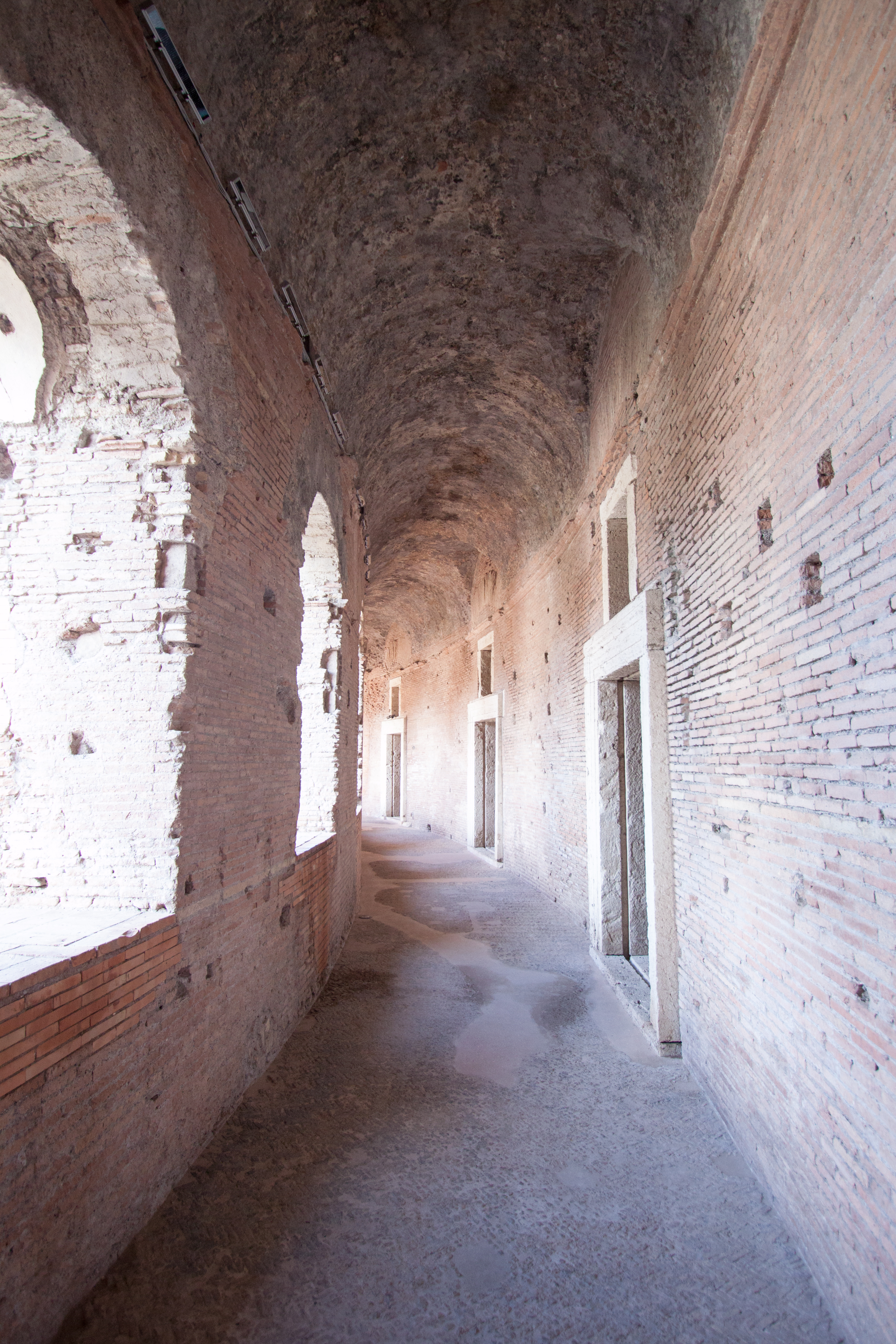 Mercato di Traiano